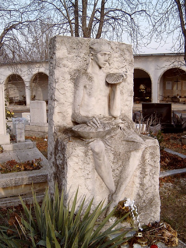 Amerigo Tot sírja Trónon ülő kagylót tartó fiú szobor (Melocco Miklós, 1989). Modern, mészkő. - Budapesten. Farkasréti temető: 1-1-585/586 [szobrász: Melocco Miklós].